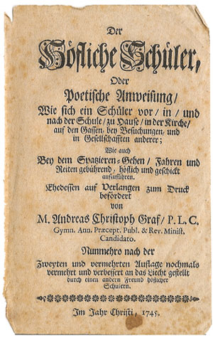 Titelseite Der höfliche Schüler